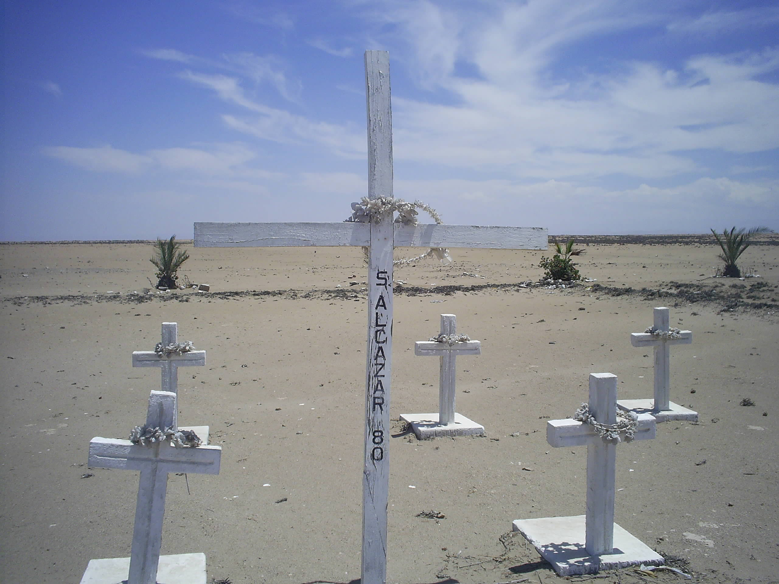 Campo de la Alianza. Homenaje a Samuel Alcazar de la columna "Agricultores de Para"